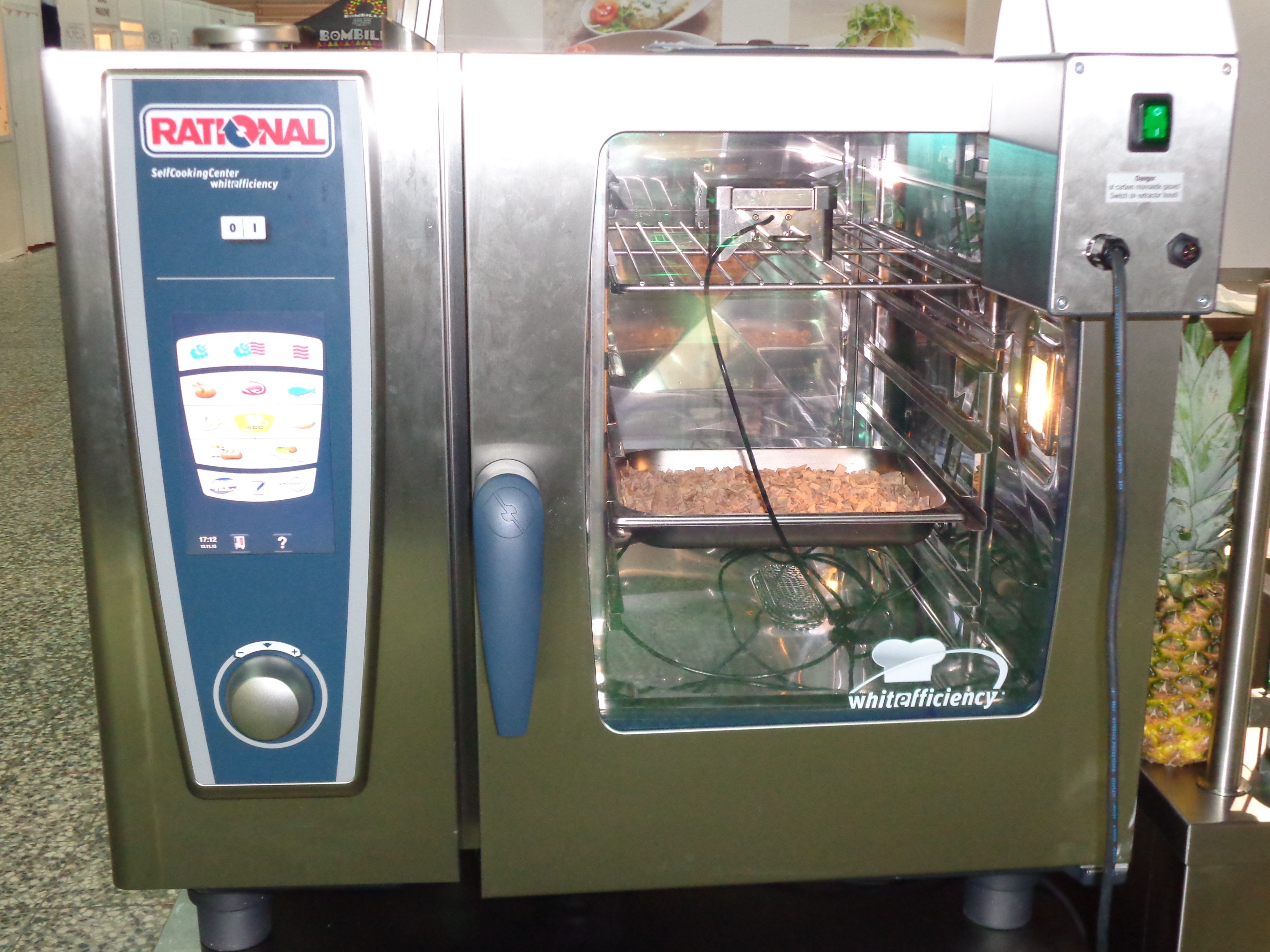 Piec konwekcyjno-parowy "Rational" prezentowany podczas Targów HORECA 2013 w Krakowie.